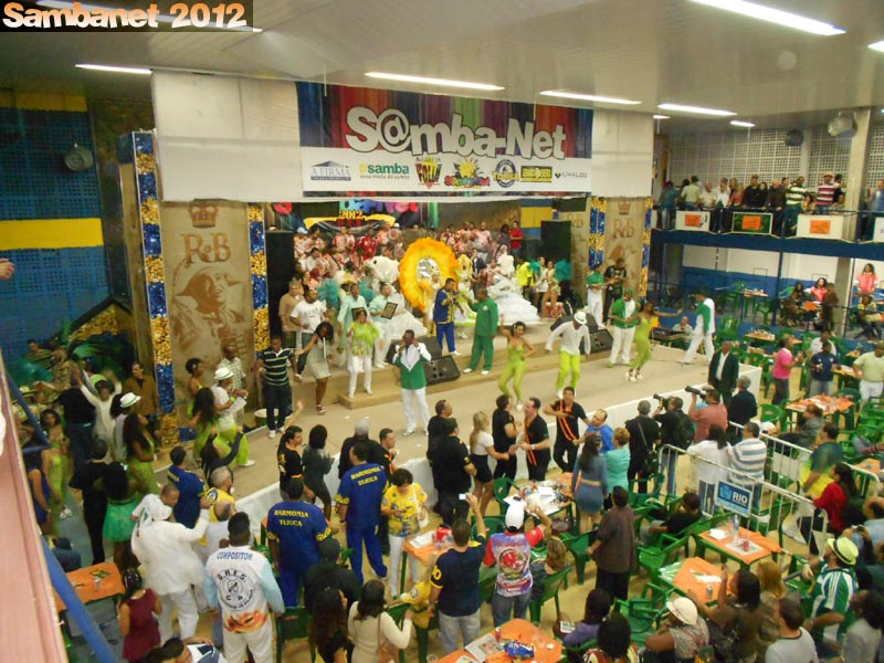 Premiação Sambanet 2012.